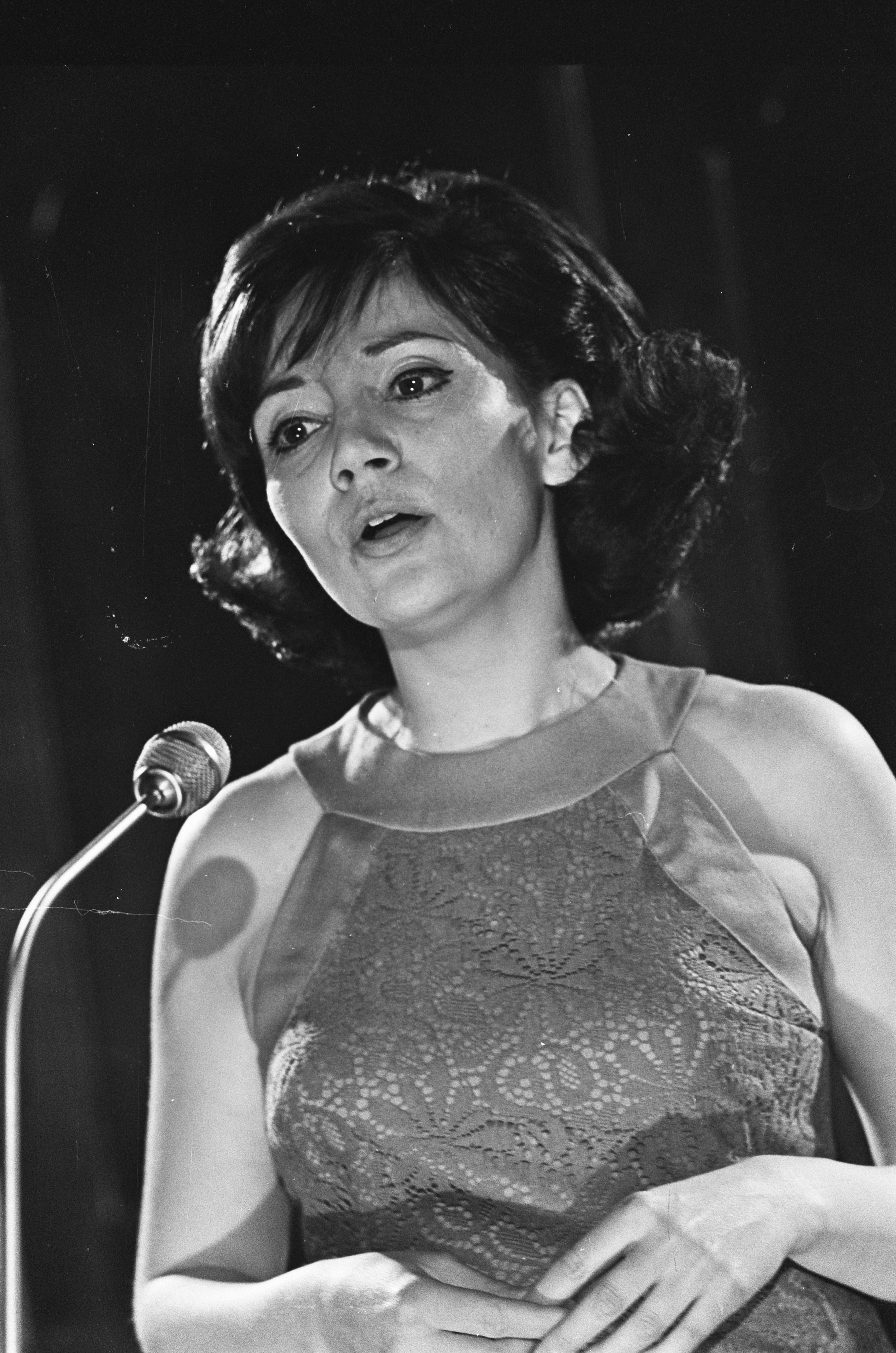 Collectie / Archief : Fotocollectie Anefo Reportage / Serie : [ onbekend ] Beschrijving : Thérèse Steinmetz tijdens repetitie voor Nederlands Songfestival Datum : 22 februari 1967 Trefwoorden : portretten, repetities, songfestivals, zangeressen Persoonsnaam : Steinmetz, Thérèse Fotograaf : Nijs, Jac. de / Anefo, [onbekend] Auteursrechthebbende : Nationaal Archief Materiaalsoort : Negatief (zwart/wit) Nummer archiefinventaris : bekijk toegang 2.24.01.05 Bestanddeelnummer : 920-0998